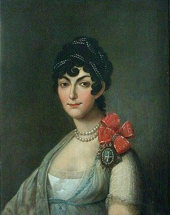 Александра Николаевна Вязмитинова, ур. Энгельгардт (1767—1848)